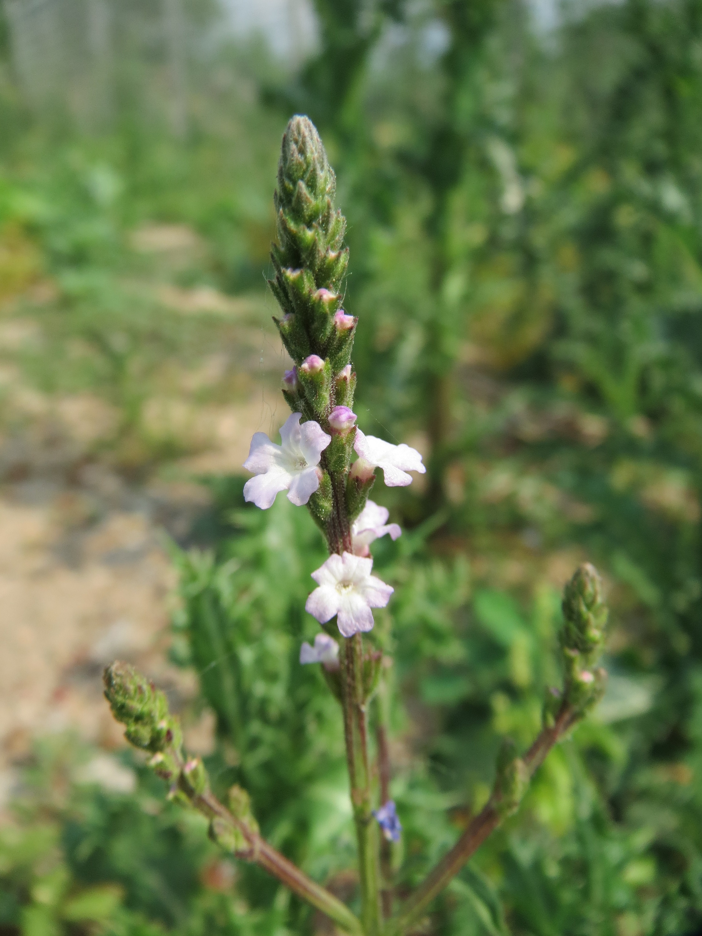 Echtes Eisenkraut (Verbena officinalis) auf einem Schuttplatz bei Neulußheim (Gemarkung Altlußheim)